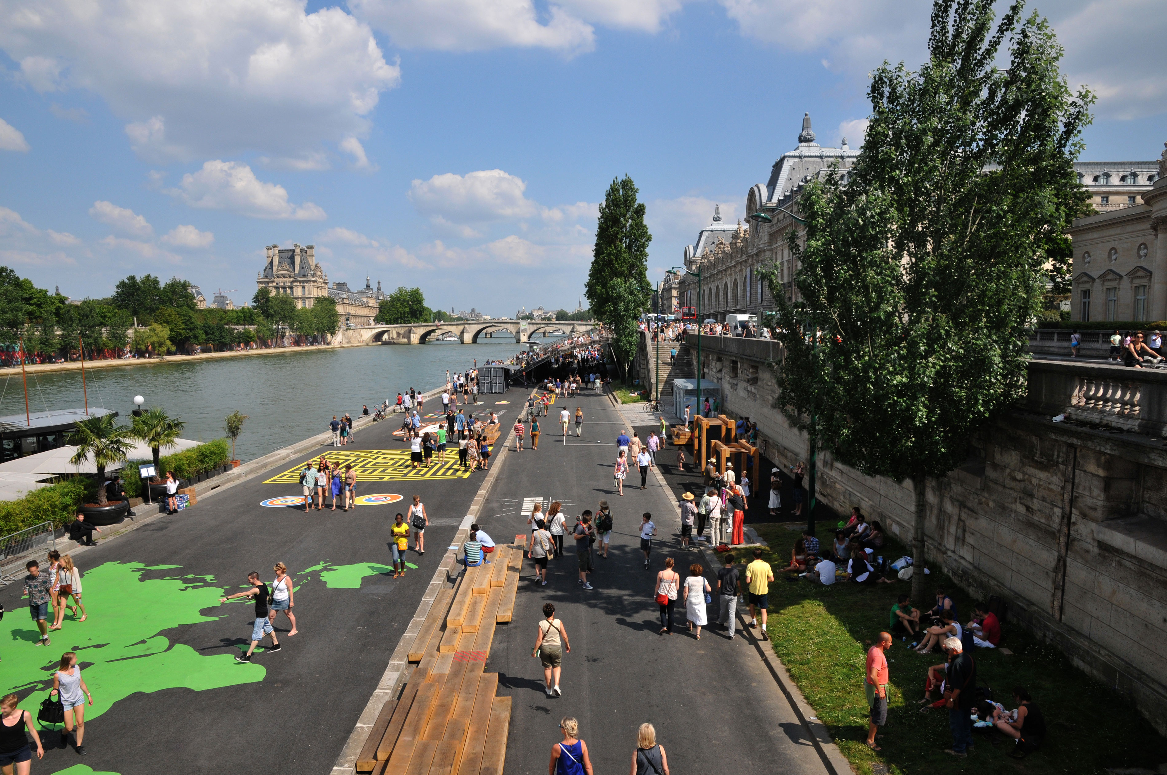 Berges de Seine réaménagées, été, Paris